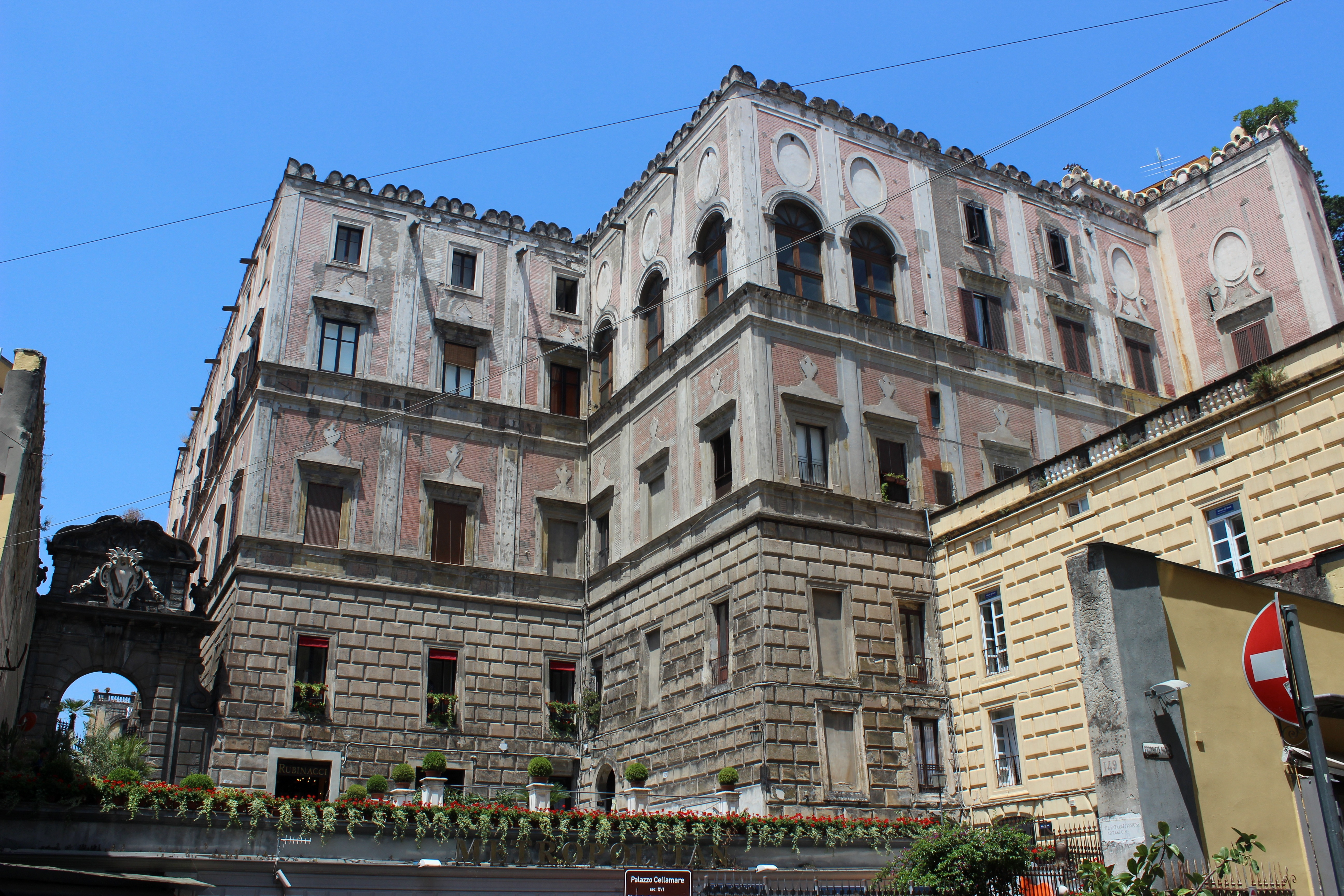 Nápoles. Palazzo Cellamare.